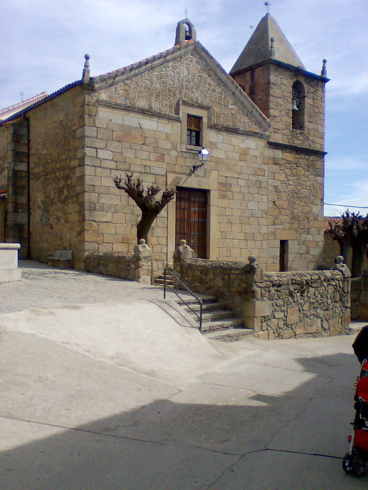 Vista de la fachada principal de la Iglesia de El Torno (Cáceres)